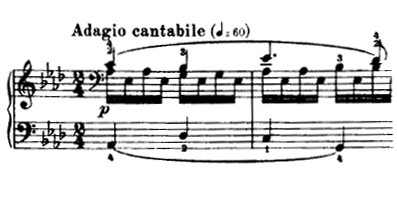 Compassos iniciais do segundo movimento da Sonata Op. 13 de Beethoven